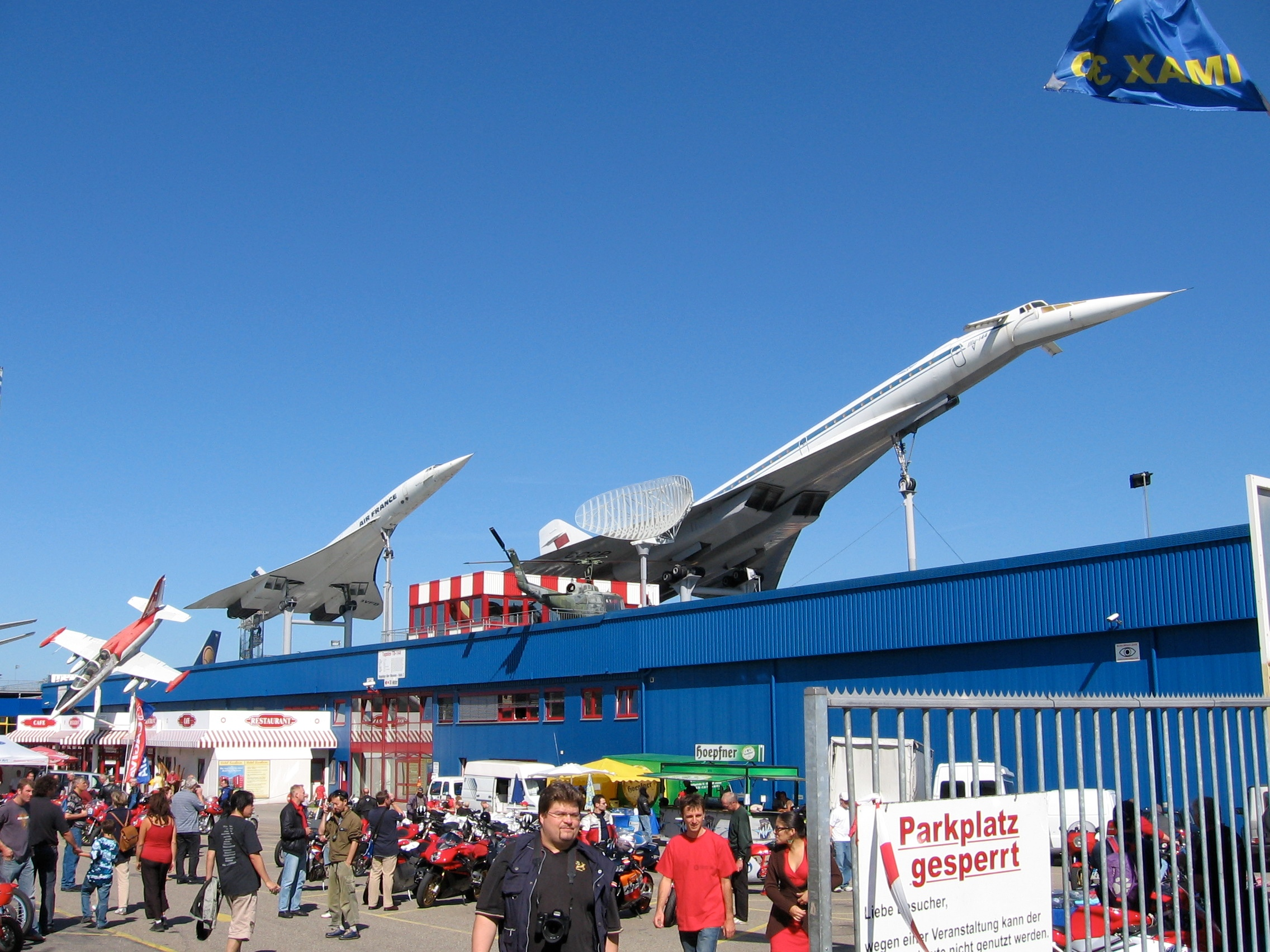 External view of the Sinsheim Auto & Technik Museum